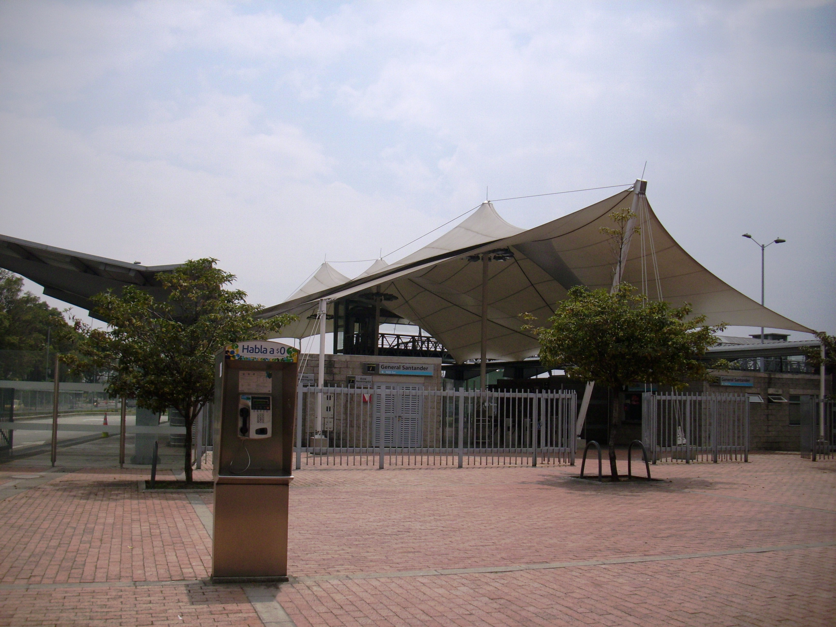 Estación Alimentadores General Santander